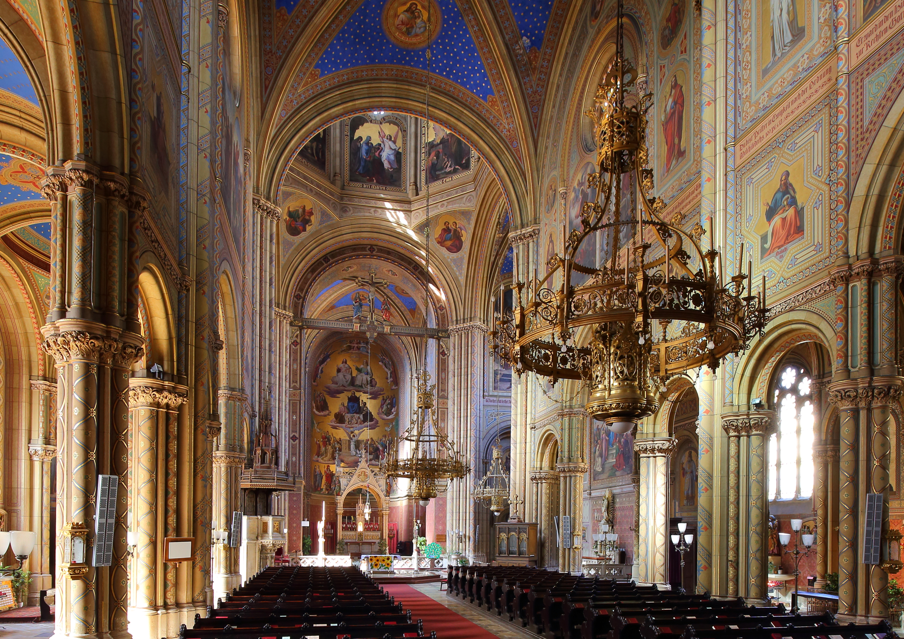 Innenansicht der Altlerchenfelder Pfarrkirche im 7. Wiener Gemeindebezirk Neubau. Die Kirche wurde ab 1848 errichtet und 1861 geweiht. 1853 war der Rohbau fertig und Eduard van der Nüll gegann mit der Innenausstattung und Josef Führich mit der malerischen Gestaltung (Entwurf des Freskenzyklus.